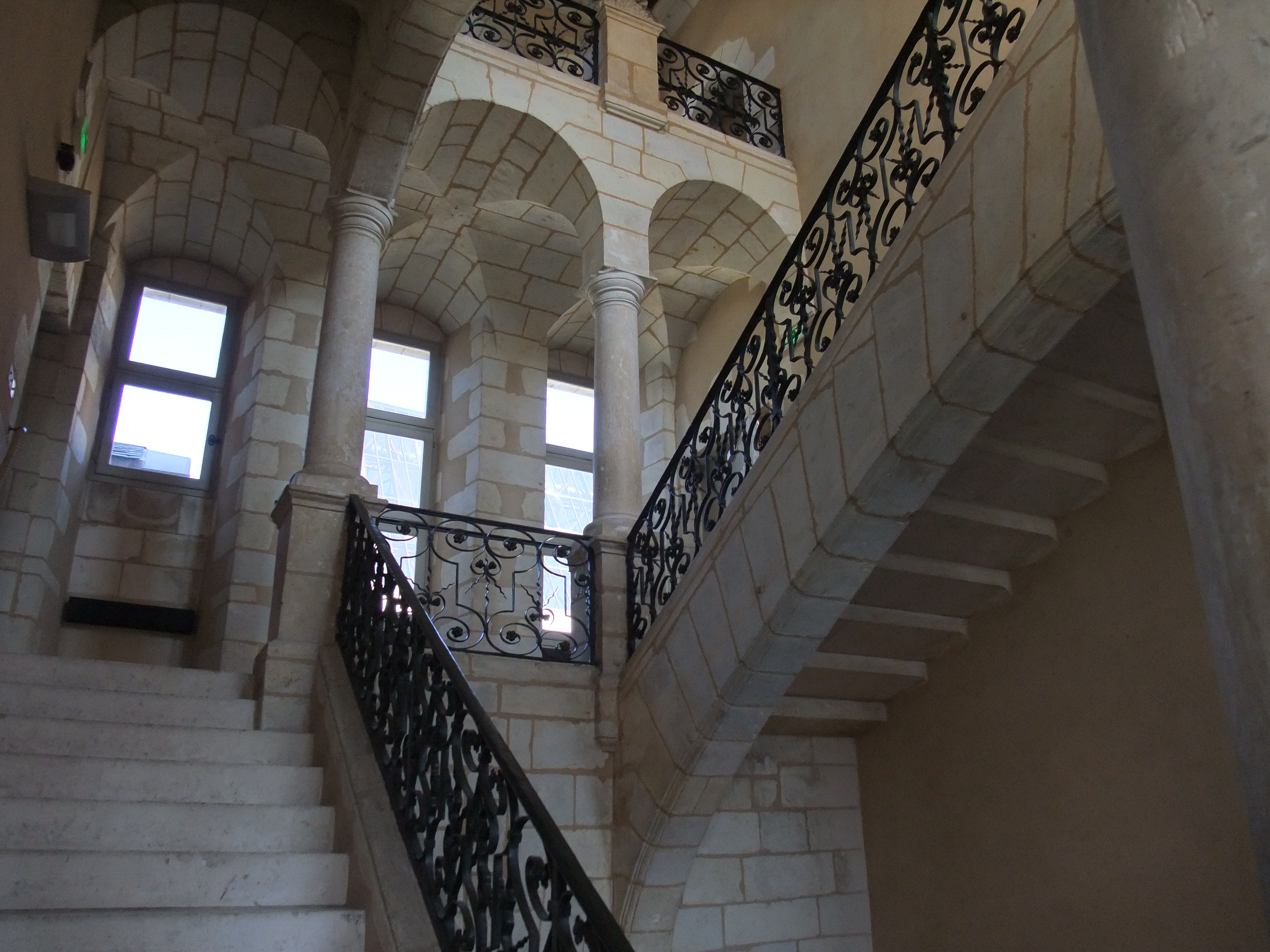 Escalier de la partie ancienne de la bibliothèque Toussaint à Angers